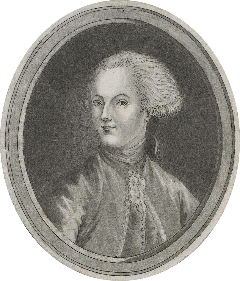 Porträt Marc Antoine Nicolas de La Mottes